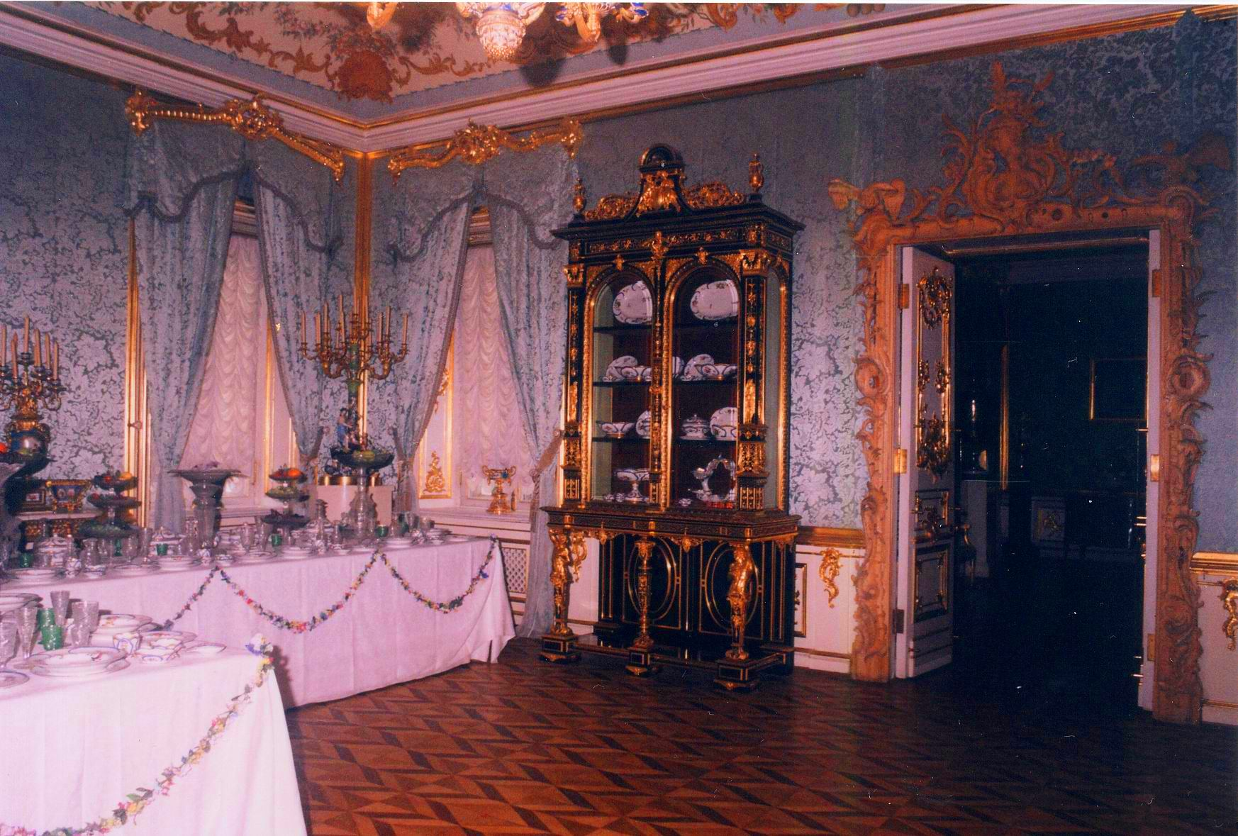 Большой дворец (Санкт-Петербург и Лен.область, Петергоф, Разводная улица, 2)